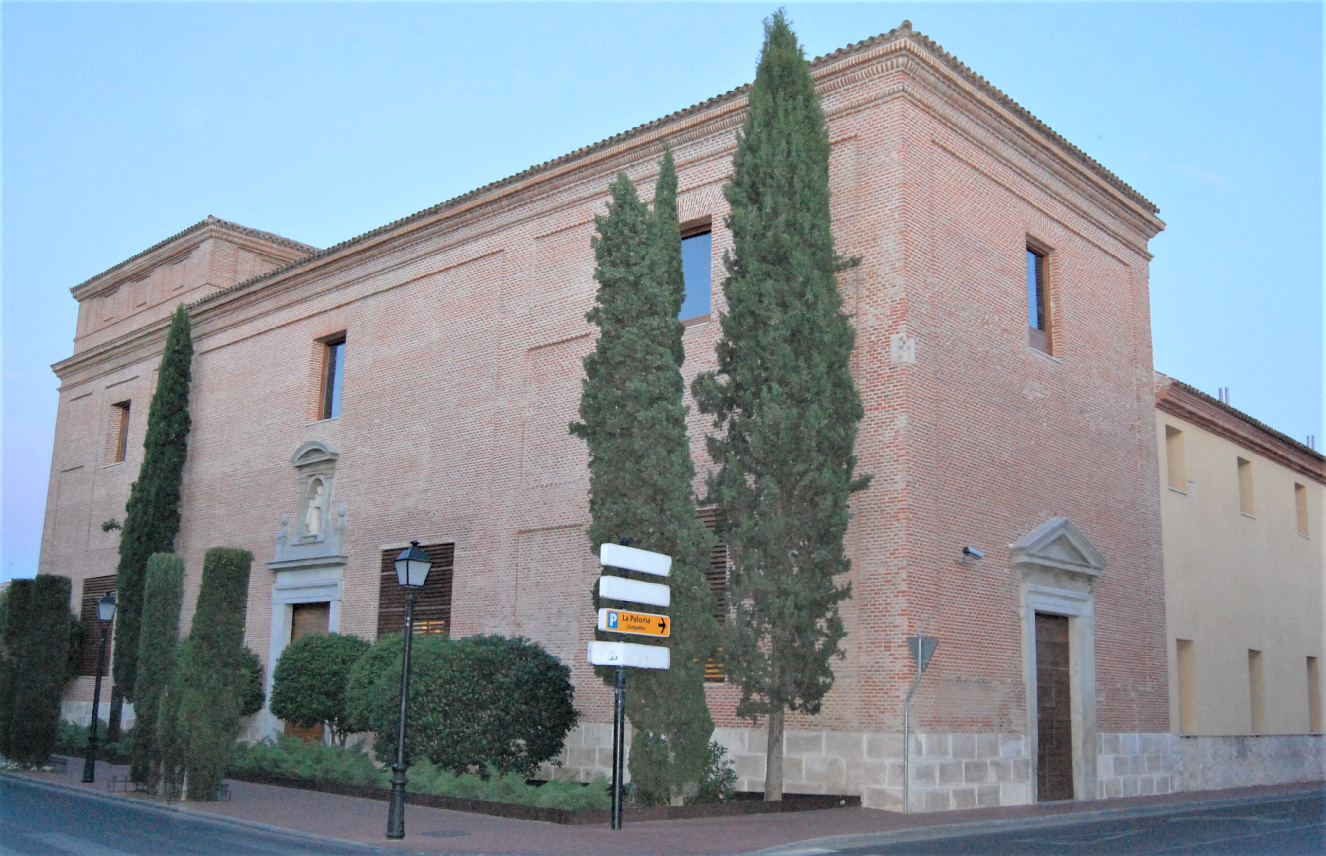 Capilla del antiguo Colegio-convento de dominicos de Santo Tomás de Aquino. Posteriormente centro penitenciario para hombres. Y en la actualidad Parador de Alcalá de Henares (Comunidad de Madrid - España